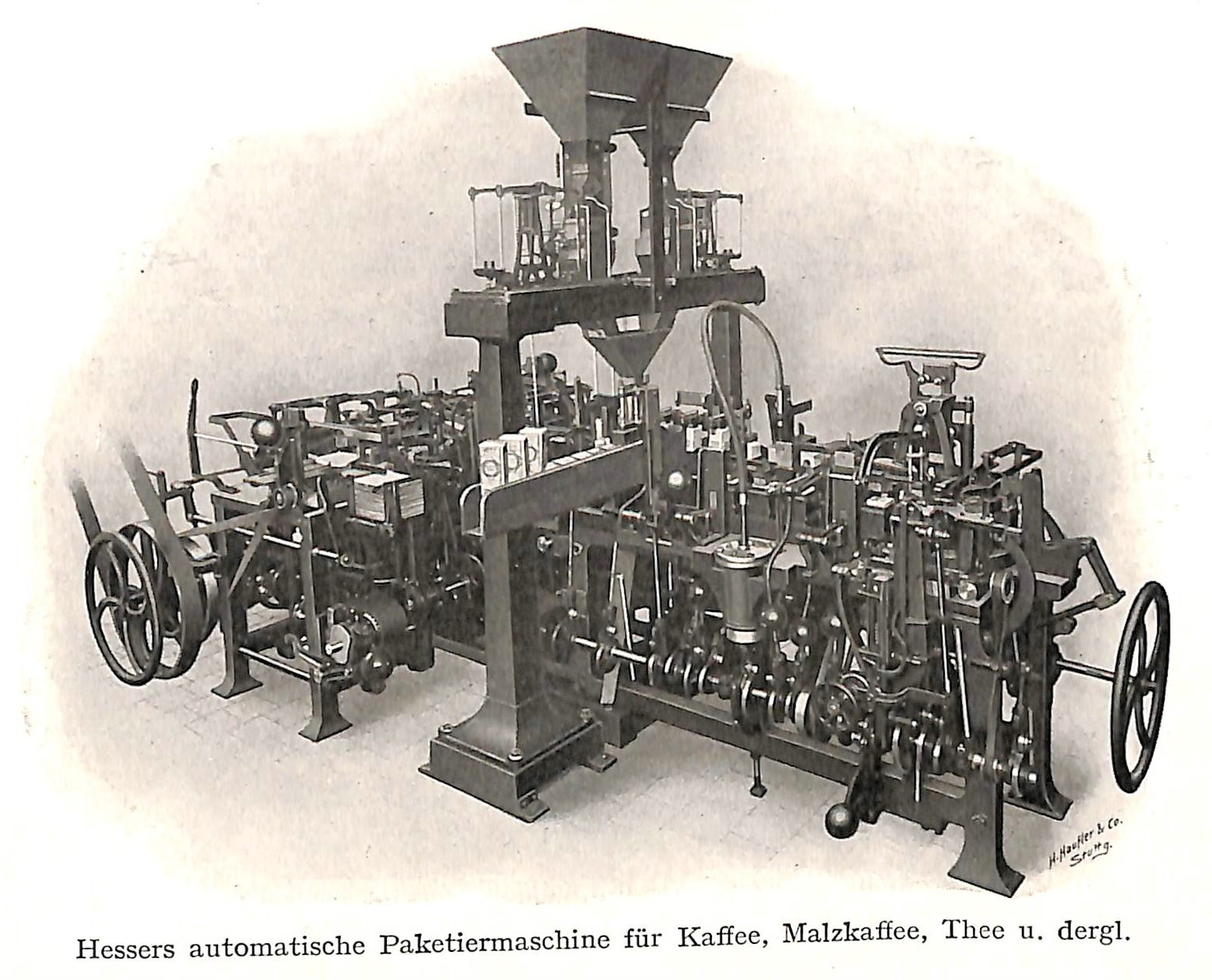 Cannstadt. - das 1861 als Kuvert-Maschinenfabrik gegründete Unternahmen hat sich seit 1870 auf die Herstellung von Einwickelmaschinen und automatische Wage und Abfüllvorichtungen mit anschließender Verpackung (Tee und Kaffee, ect.) sowie Etikettiermaschinen spezialisiert.